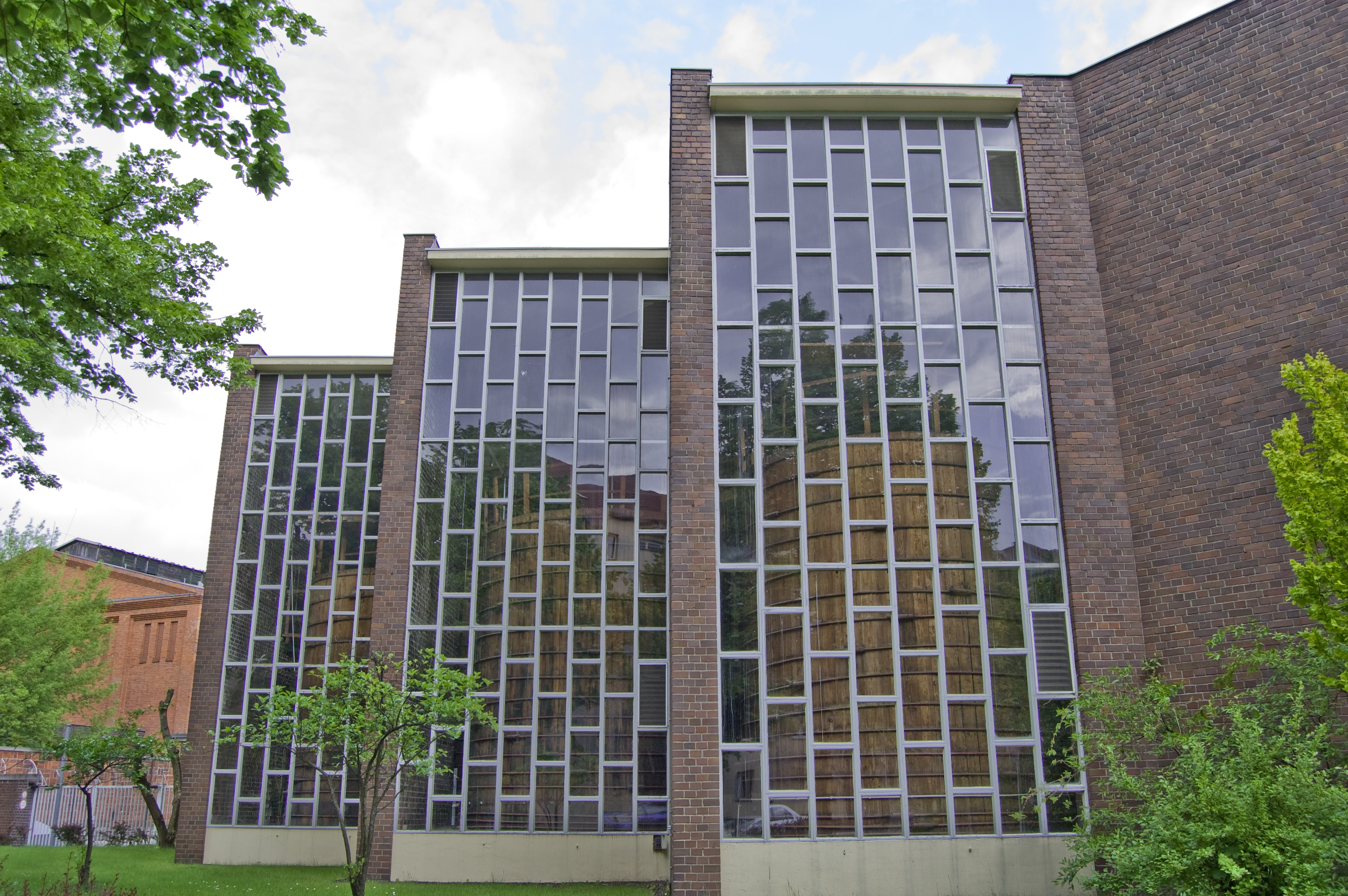 Industrielle Essig-Herstellung in Berlin